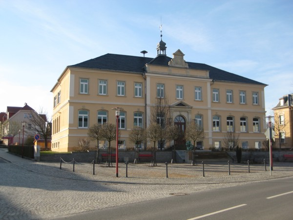 Grundschule Demitz-Thumitz (Landkreis Bautzen)